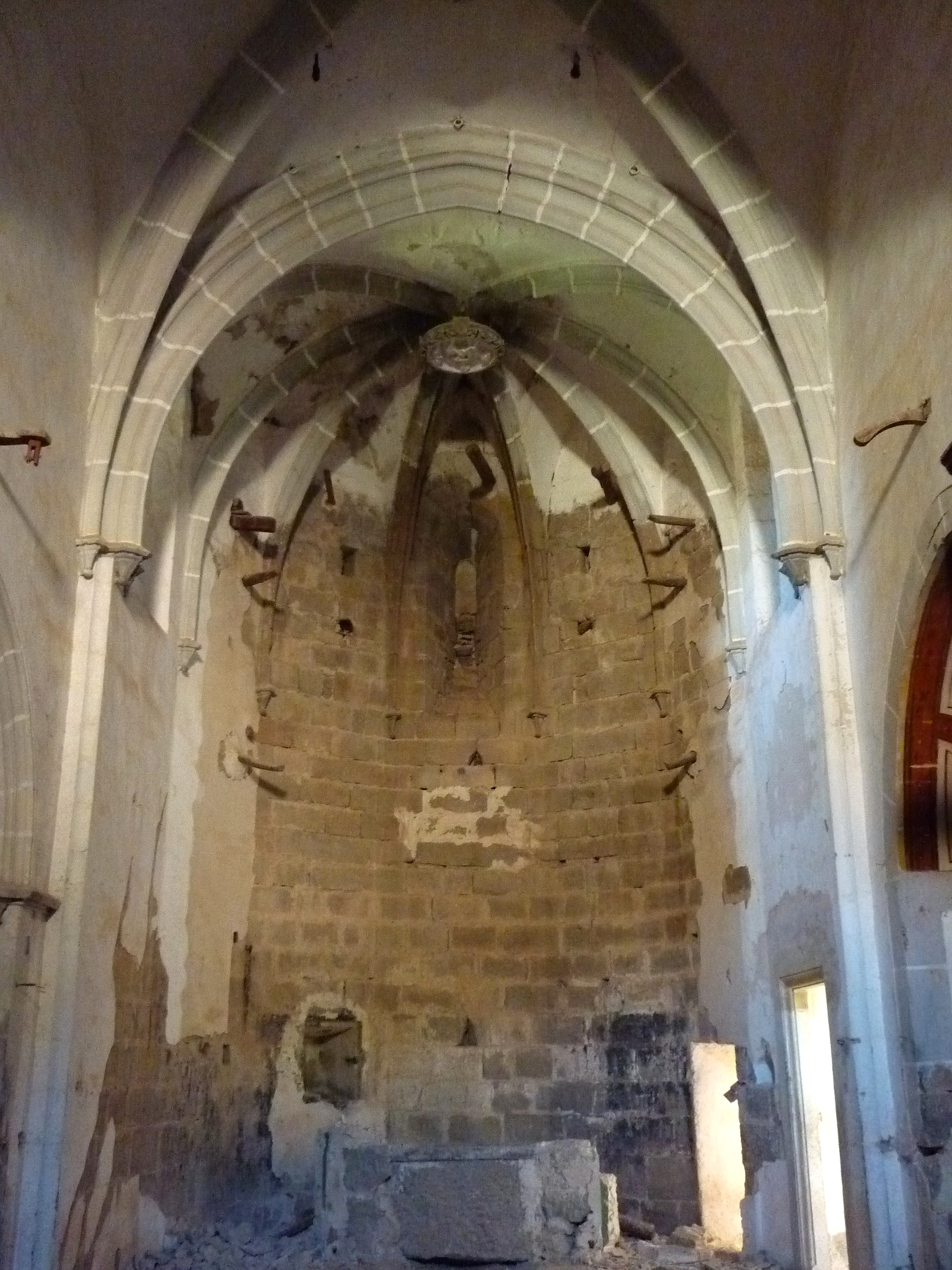 Capçalera de l'església de Sant Martí de Llanera, a Torà (Segarra)